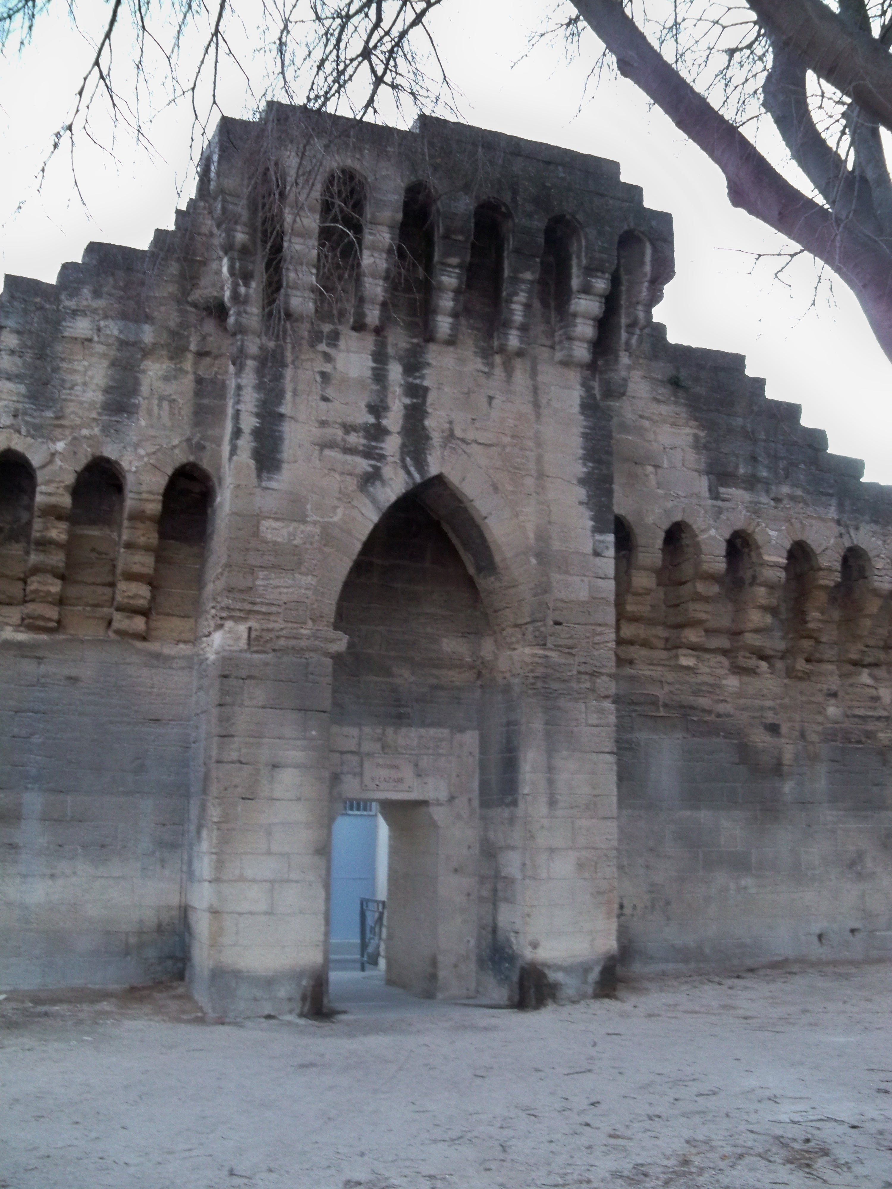 Poterne Saint Lazare des remparts d'Avignon, Vaucluse, France